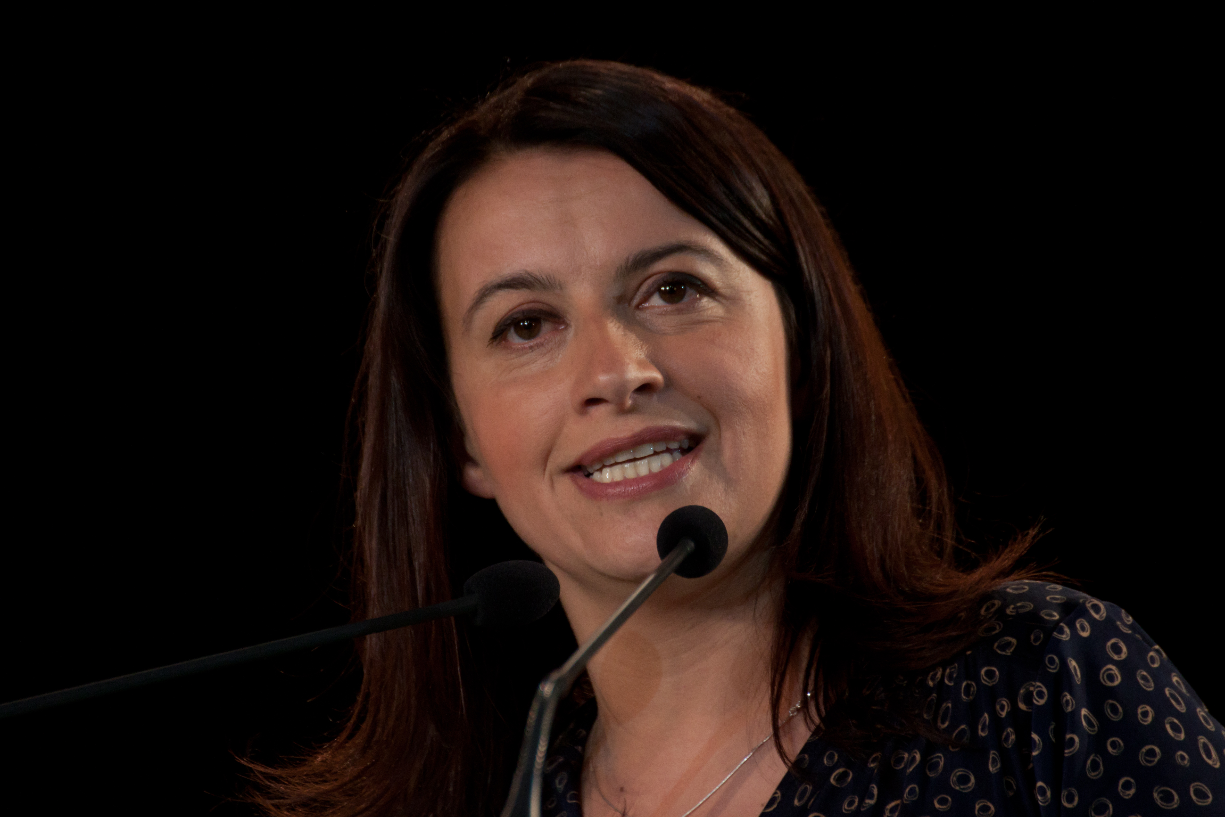 Cécile Duflot, présente lors du meeting d'Eva Joly à Grenoble, le 12 avril 2012.